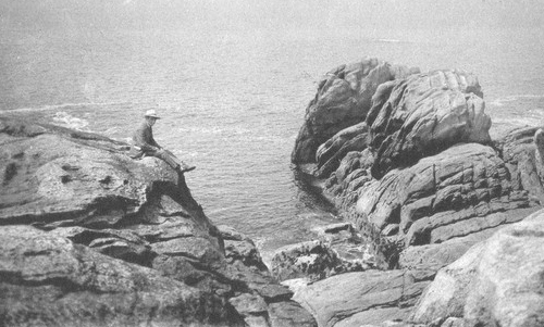 Saint-Guénolé-Penmarc'h : rochers près de la "Roche des victimes" (drame du 10 octobre 1870 : le Préfet du Finistère, Gustave Levainville, vient pique-niquer en famille sur ce plus haut rocher de Saint-Guénolé, mais une vague déferlante emporte sa femme, sa fille et trois autres victimes de sa famille)